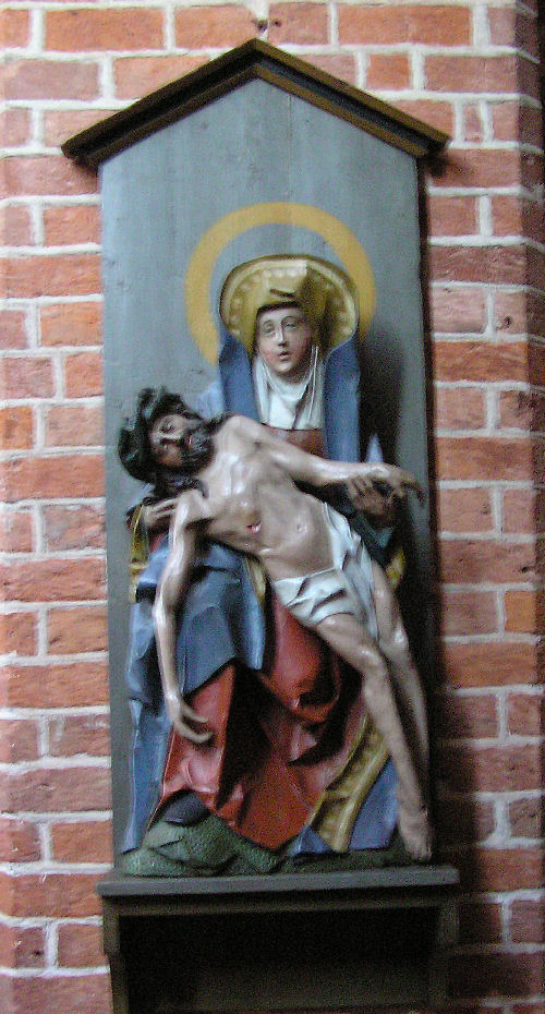 Pietà, Løgumkloster Kirke